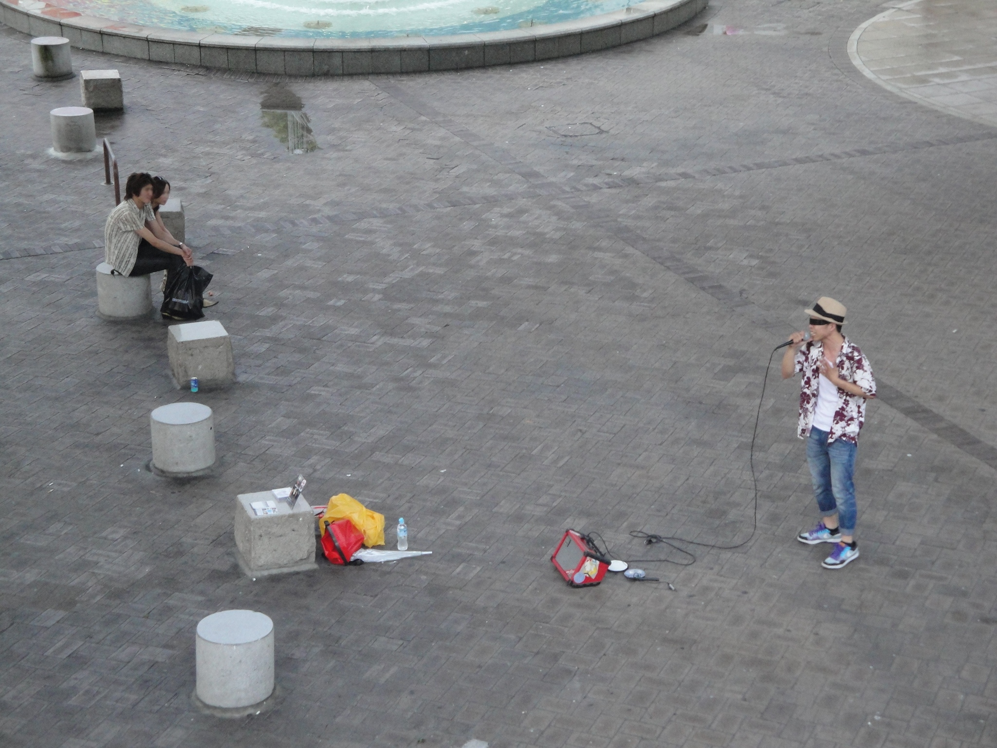 若宮大通の公園で2人の聴衆を前に歌うラッパーDo帝。